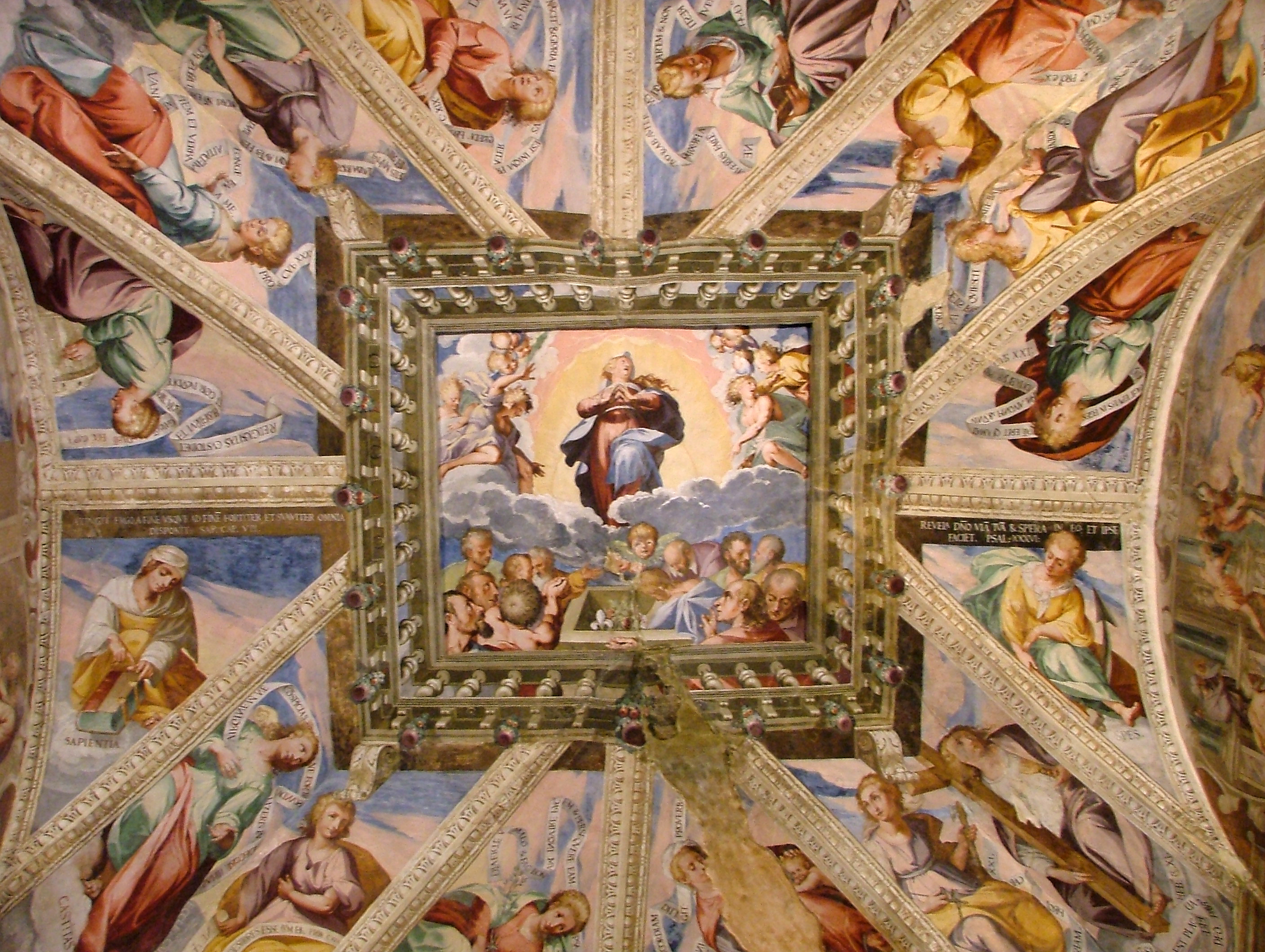 Autore: Rocco Stasi, fatta da me. Chiesa e convento del Carmine (fondato nel 1605), interamente affrescato da Pietro Antonio Ferro e dalla sua bottega tra il 1612 ed il 1616 - volta del presbiterio. La chiesa, in particolare, costituisce uno dei tasselli piÃ¹ importanti del seppur consistente patrimonio artistico ed architettonico della cittÃ . GFDL, sono l'autore